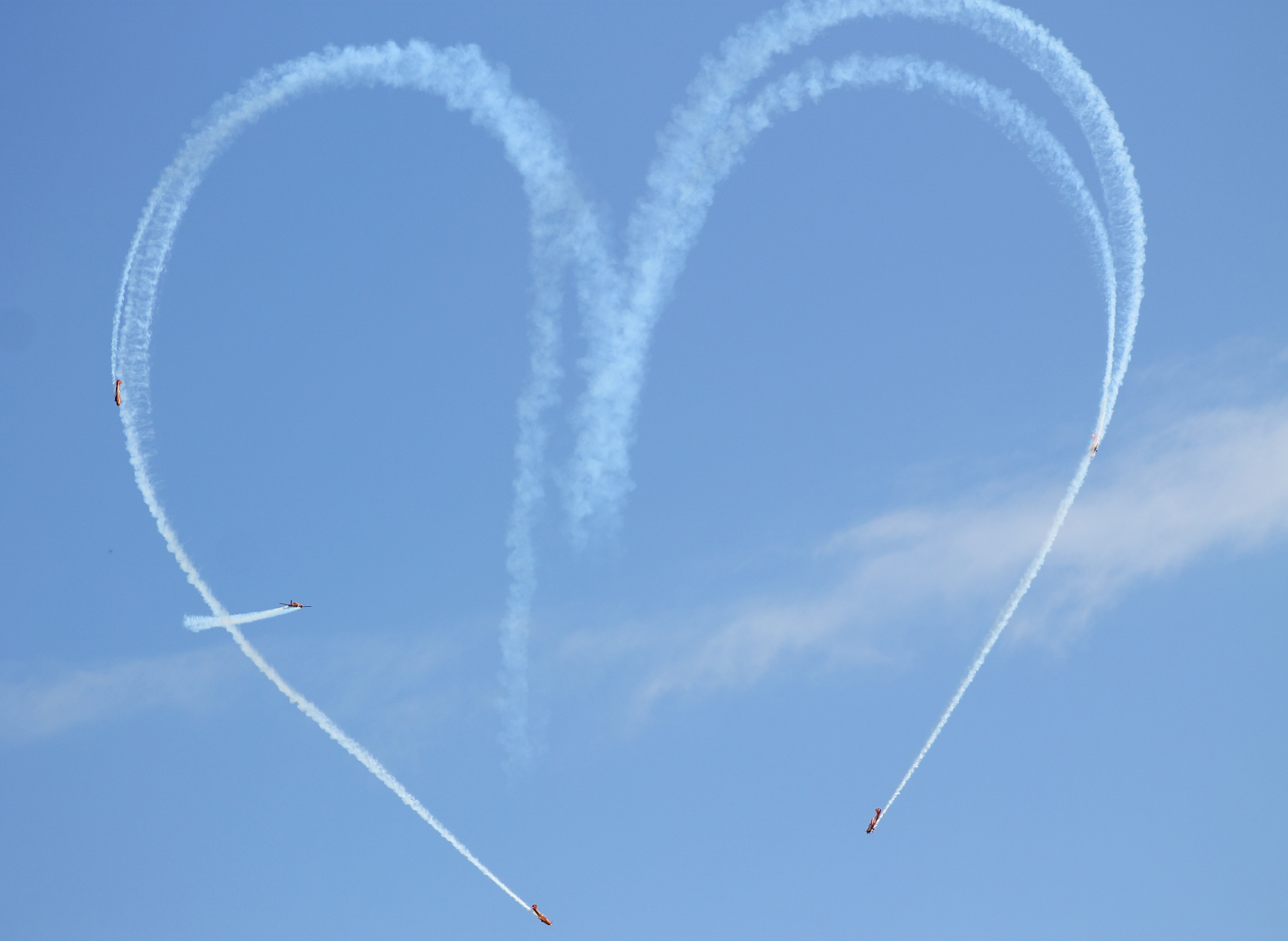 Пилотажная группа Первый полёт во время выступления в Олимпийском парке Сочи